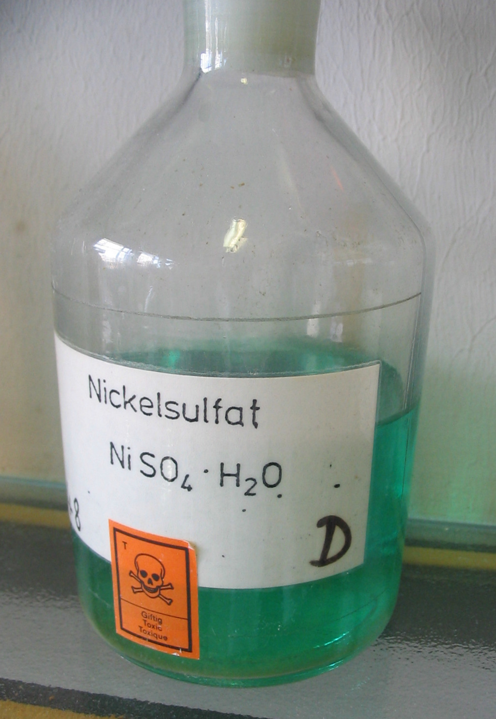 Nickelsulfat NiSO4